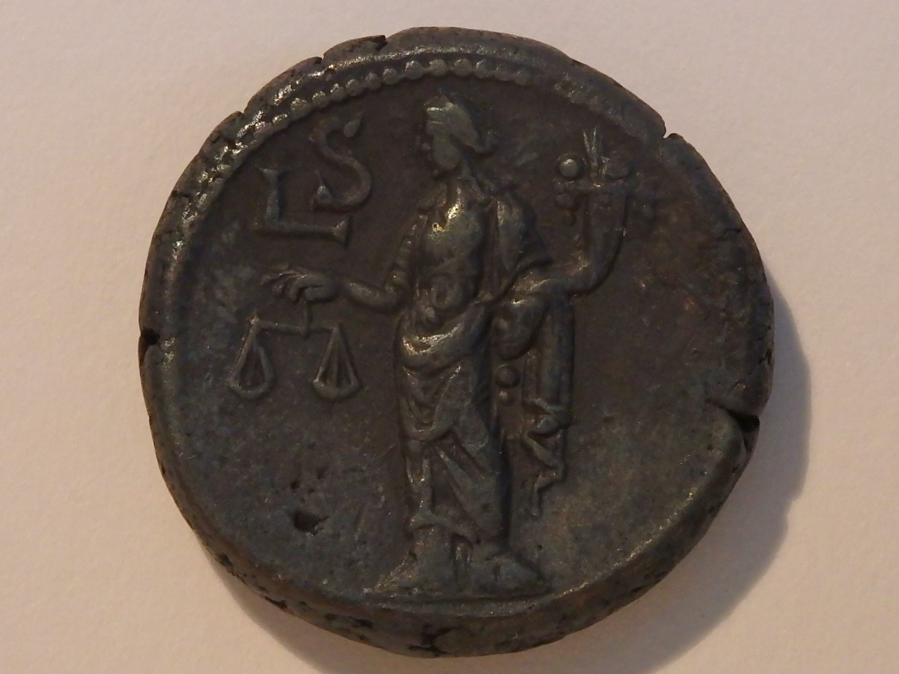 Dikaiosyne auf Tertadrachme aus Alexandria z.Zt. von Alexander Severus, Kampmann/Ganschow 62.75